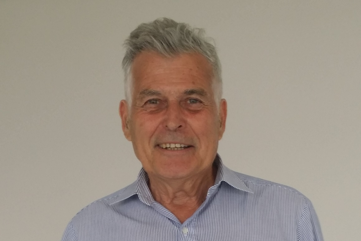 L'historien Jean Dhombres, le 22 juin 2017, AG de la SABIX à l'Ecole polytechnique (Palaiseau)